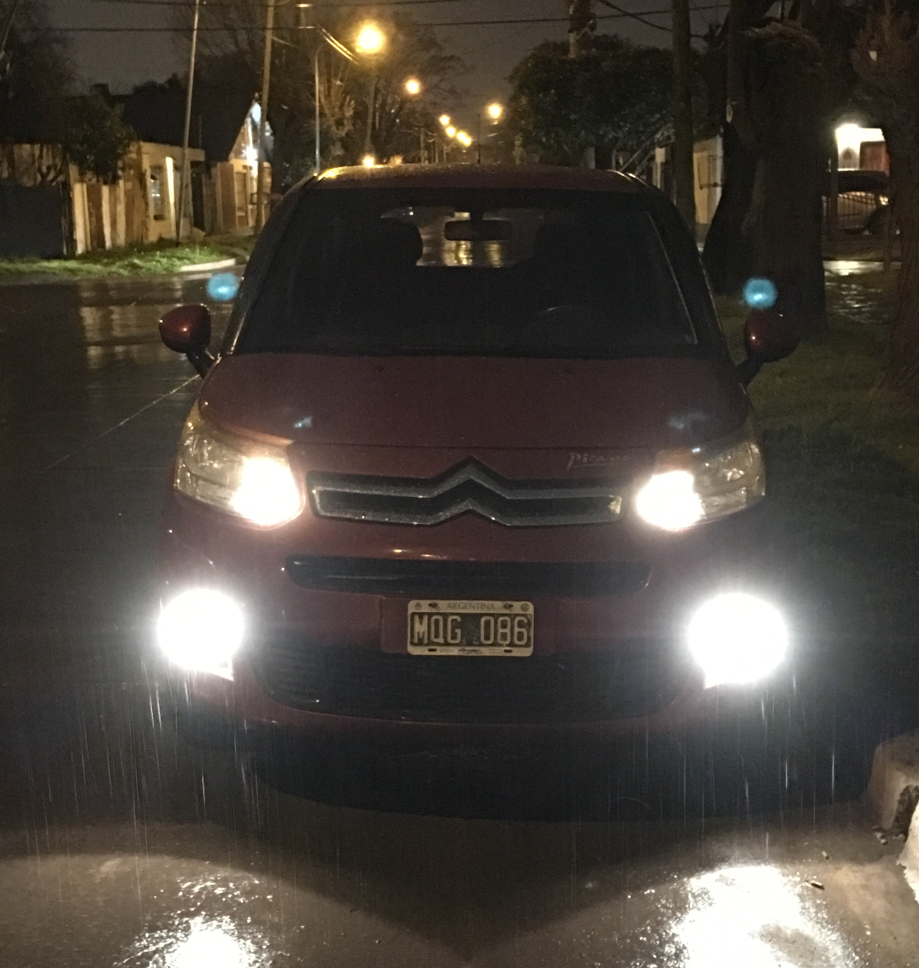 En esta imagen se puede observar el vehiculo C3 Picasso de la marca Citroen bajo la lluvia